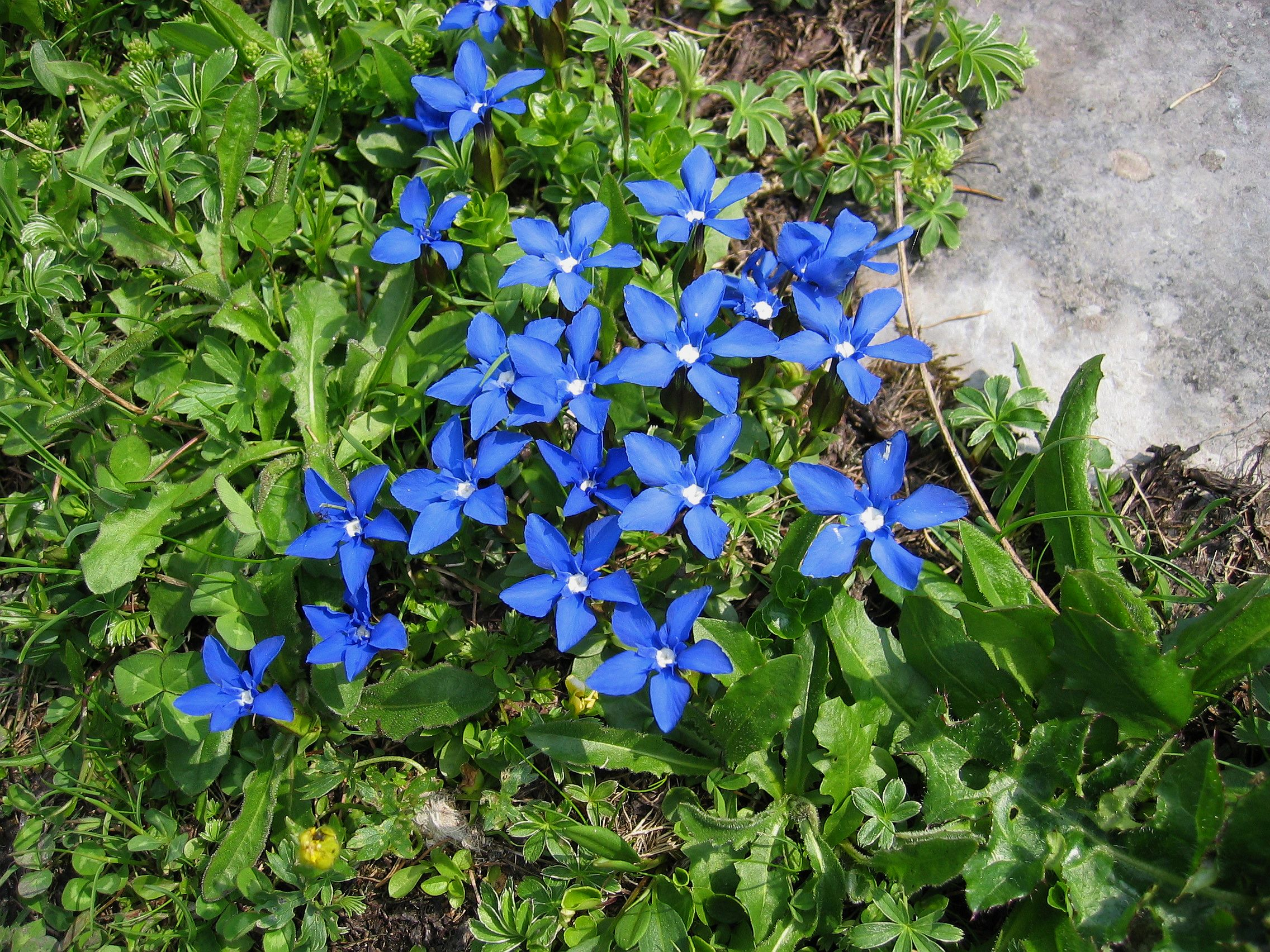 Gentiana verna , Near Liezener Hütte, Styria, Austria